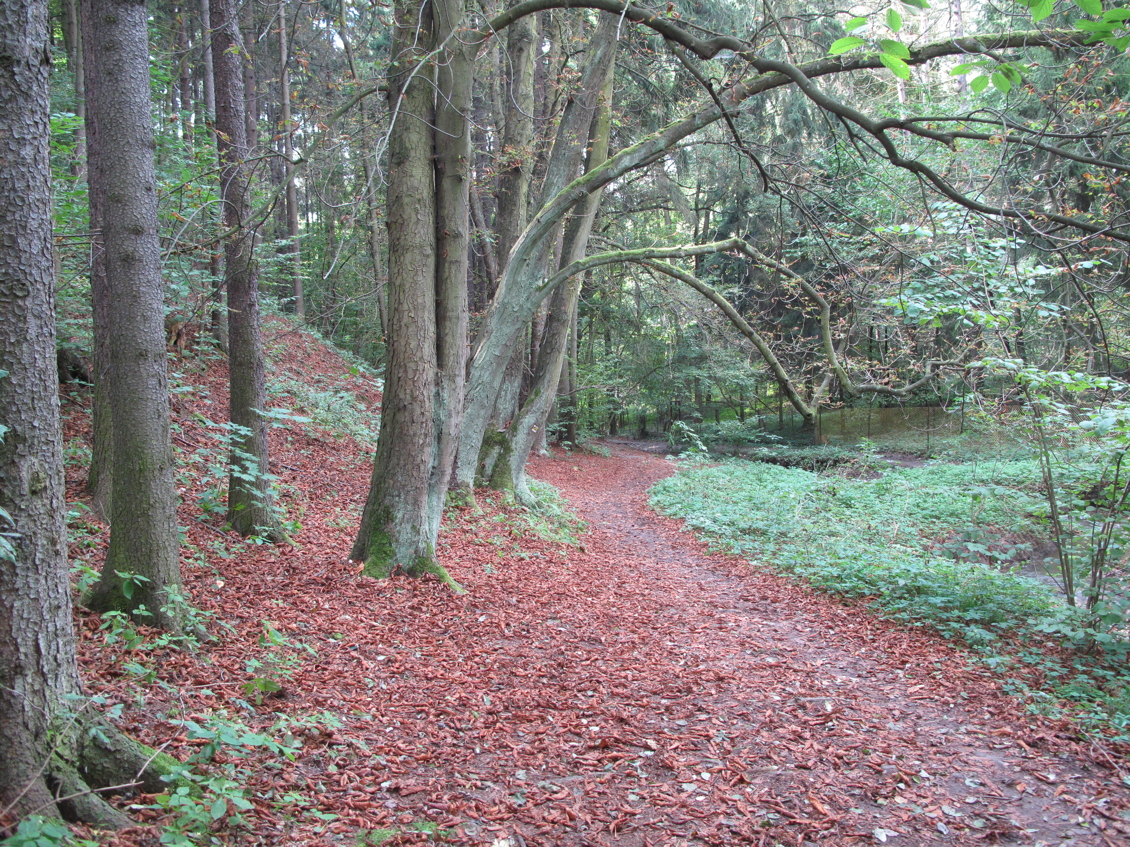 Drahanské údolí a Drahanský potok